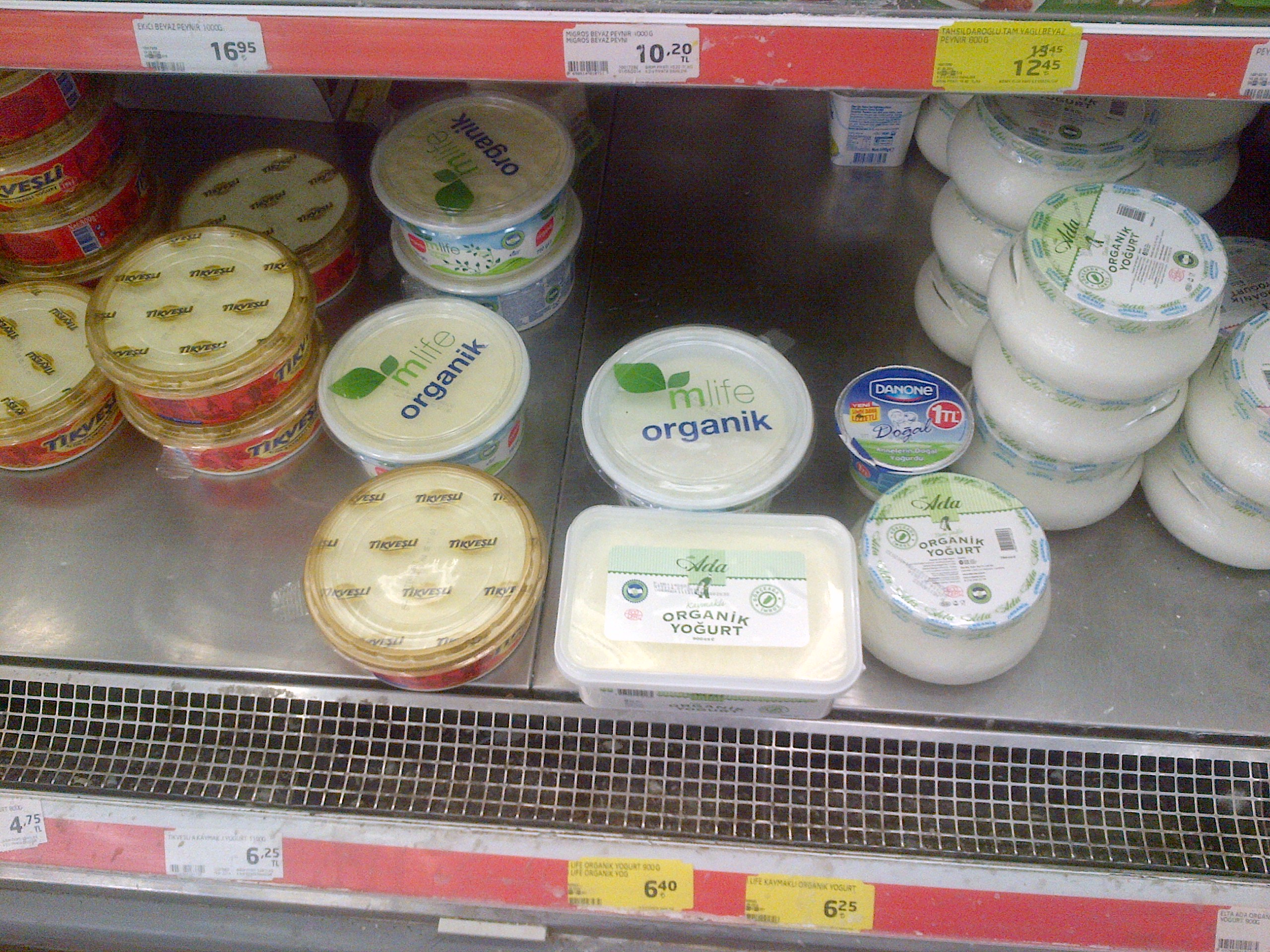 Algunos de los variantes locales, en la seccion yogur organico, de un supermercado en Ankara.